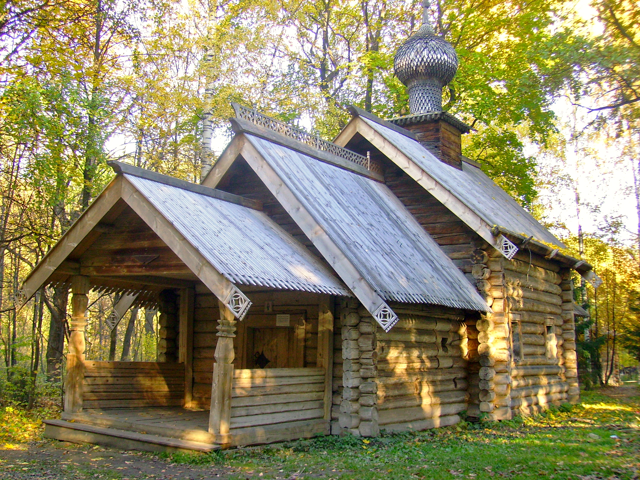 Музей архитектуры и быта народов Нижегородского Поволжья. Покровская церковь (1672)